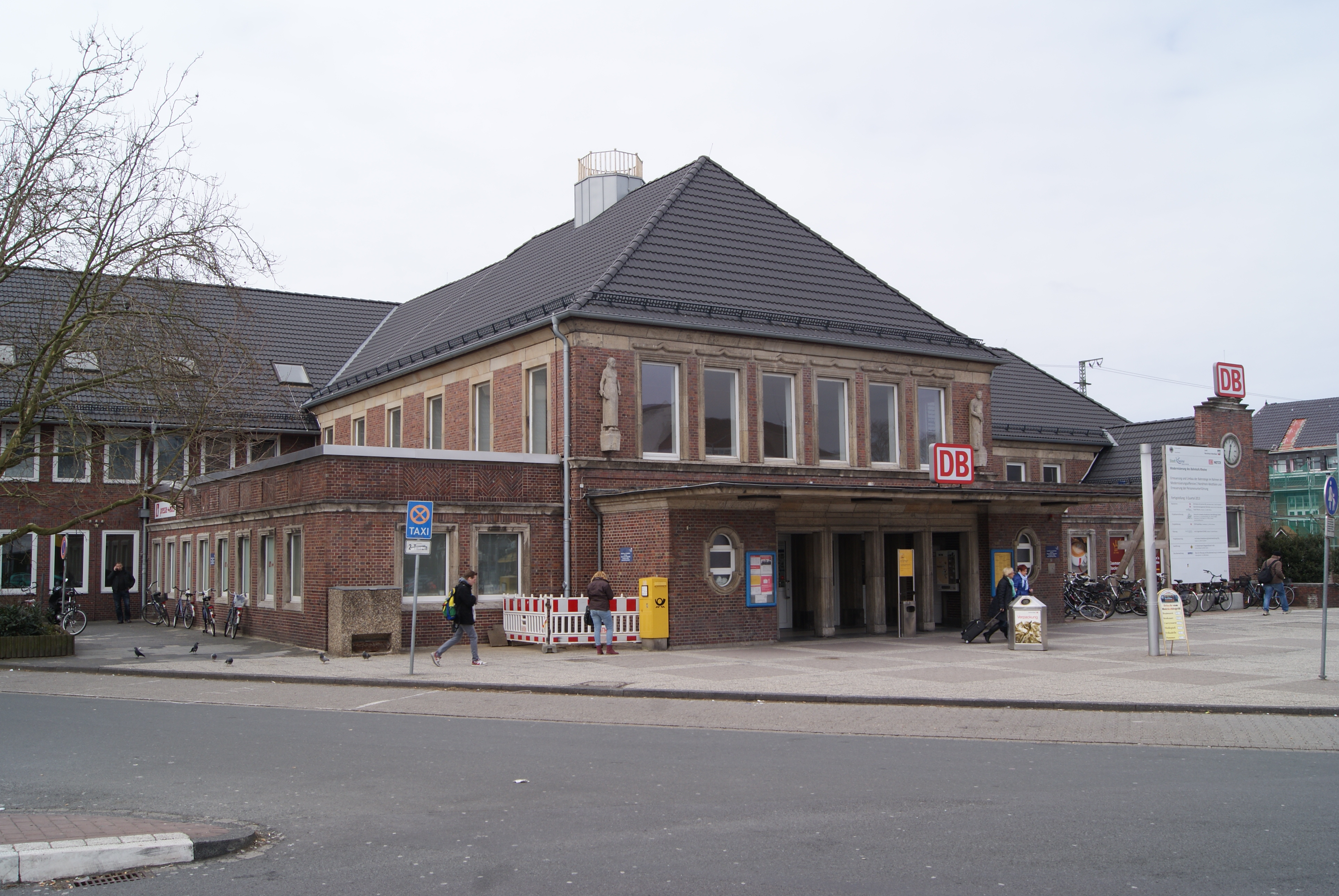 Das Empfangsgebäude des Bahnhofs Rheine.